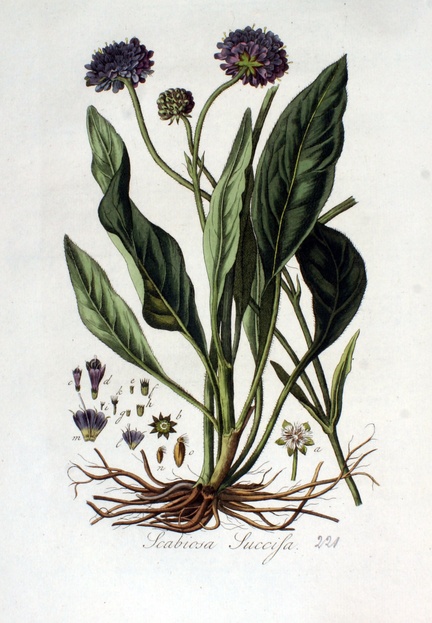 Succisa pratensis Moench (Syn. Scabiosa succisa L.)